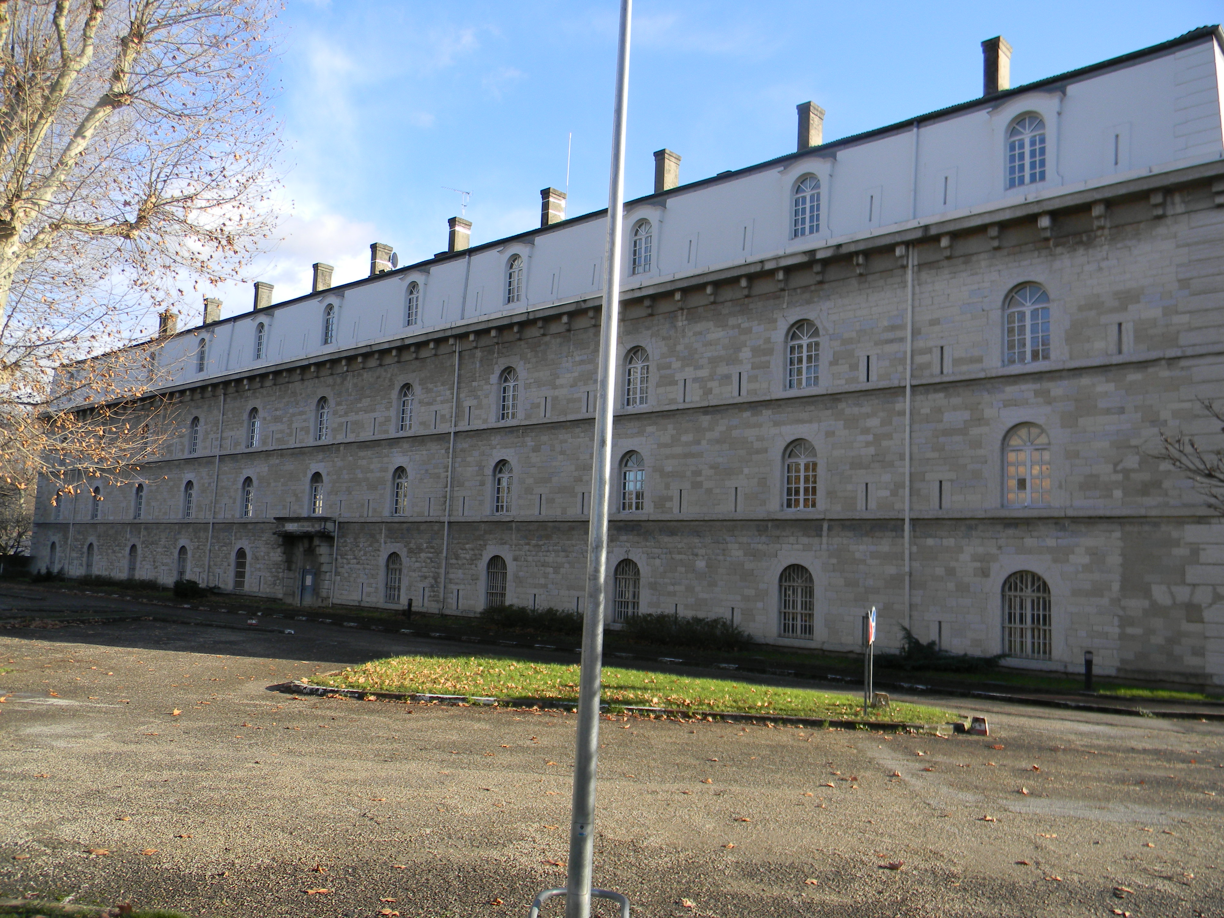 Caserne de l'ancien fort de la Vitriolerie, actuel Quartier Général-Frère à Lyon.